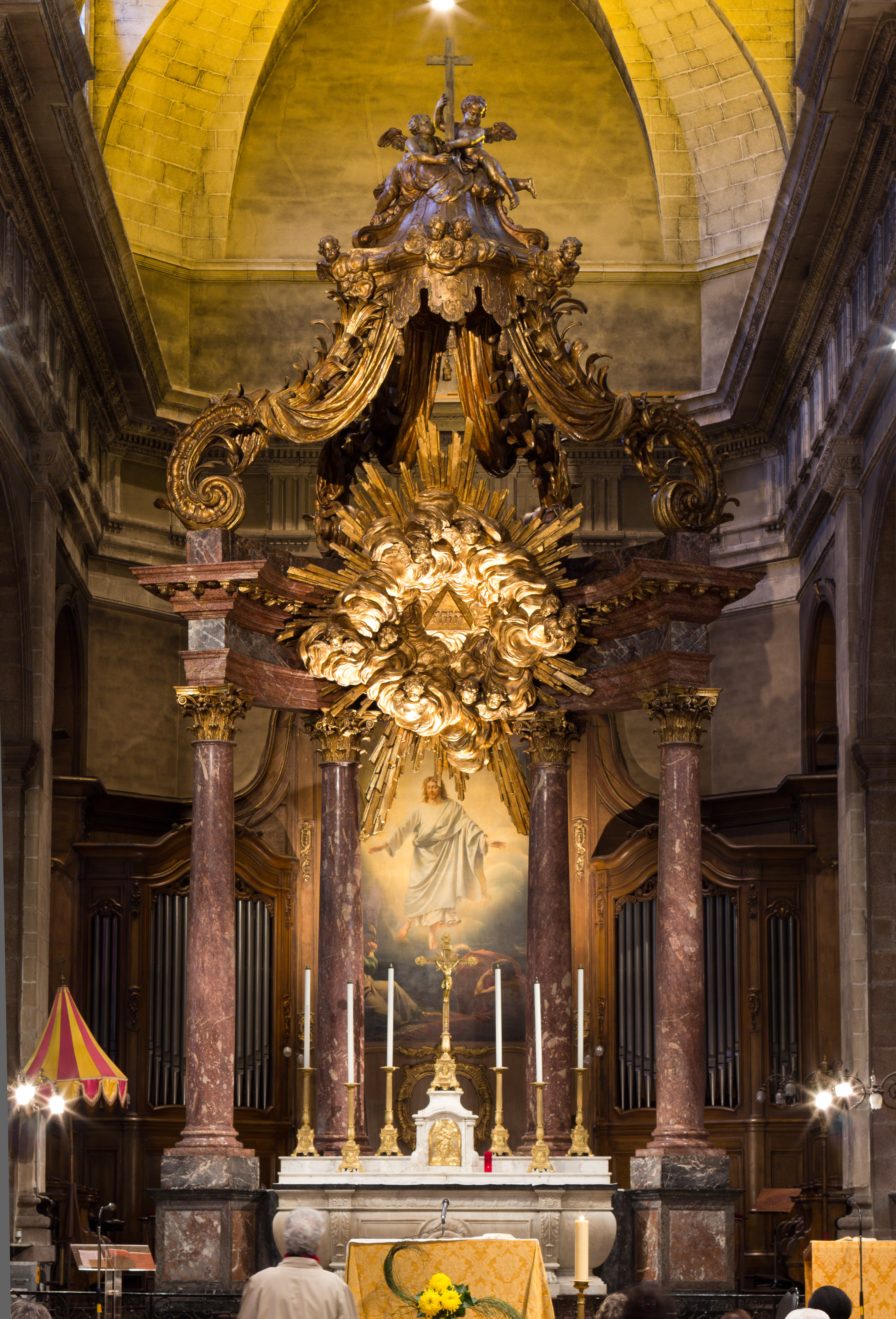 De part et d'autre de l'autel, l'ombrellino et le tintinnabule basilicaux. En arrière plan, la Transfiguration de Jean-Bruno Gassies, tableau encadré par l'orgue de chœur.